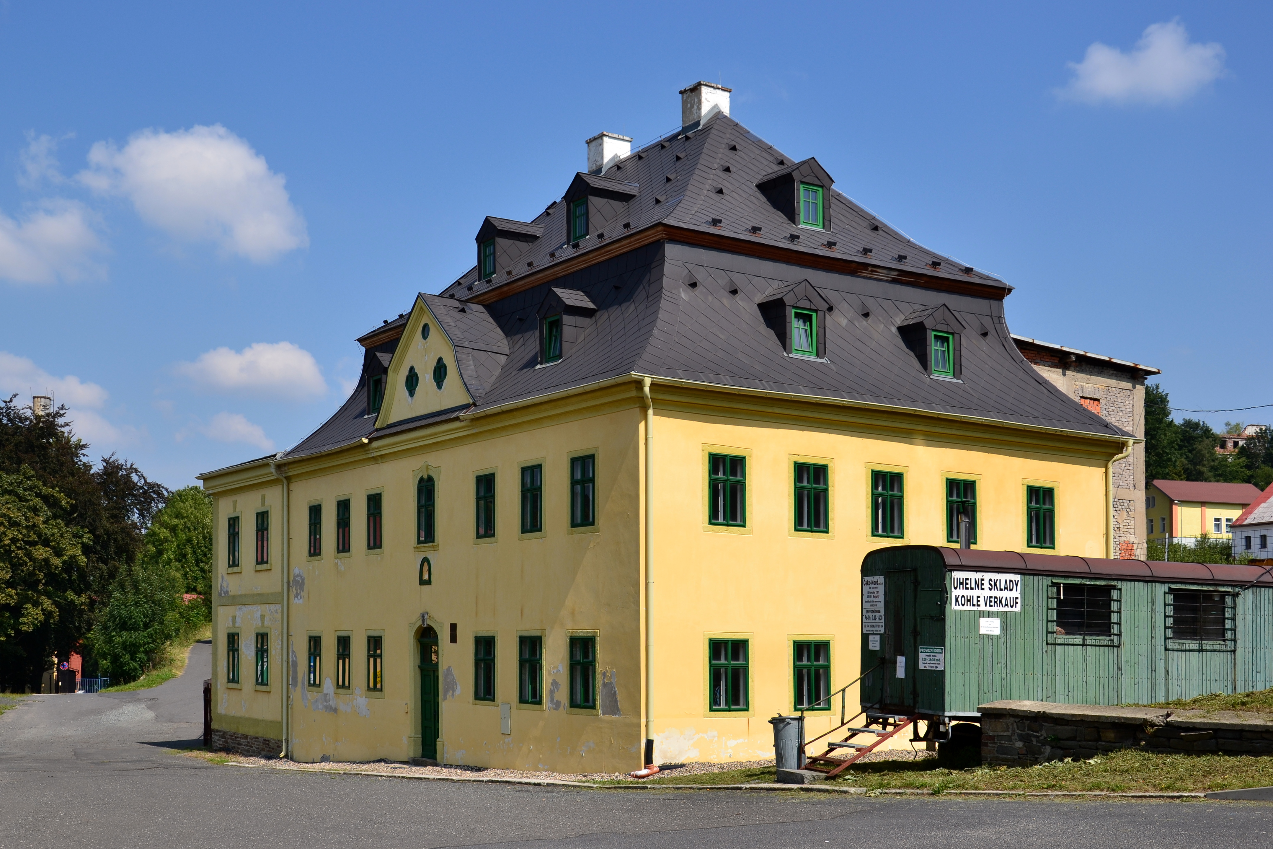 Dům čp. 309, Maxima Gorkého 309/22, Vejprty.